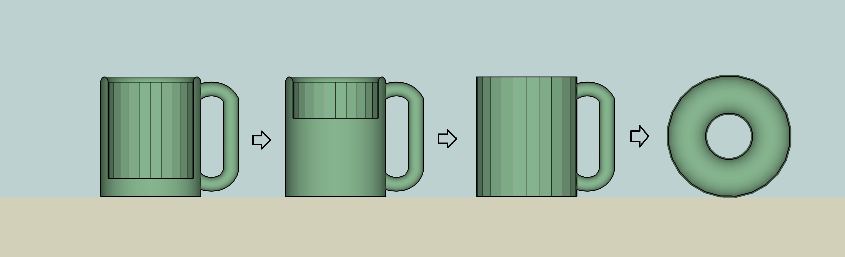 Đồng luân topology